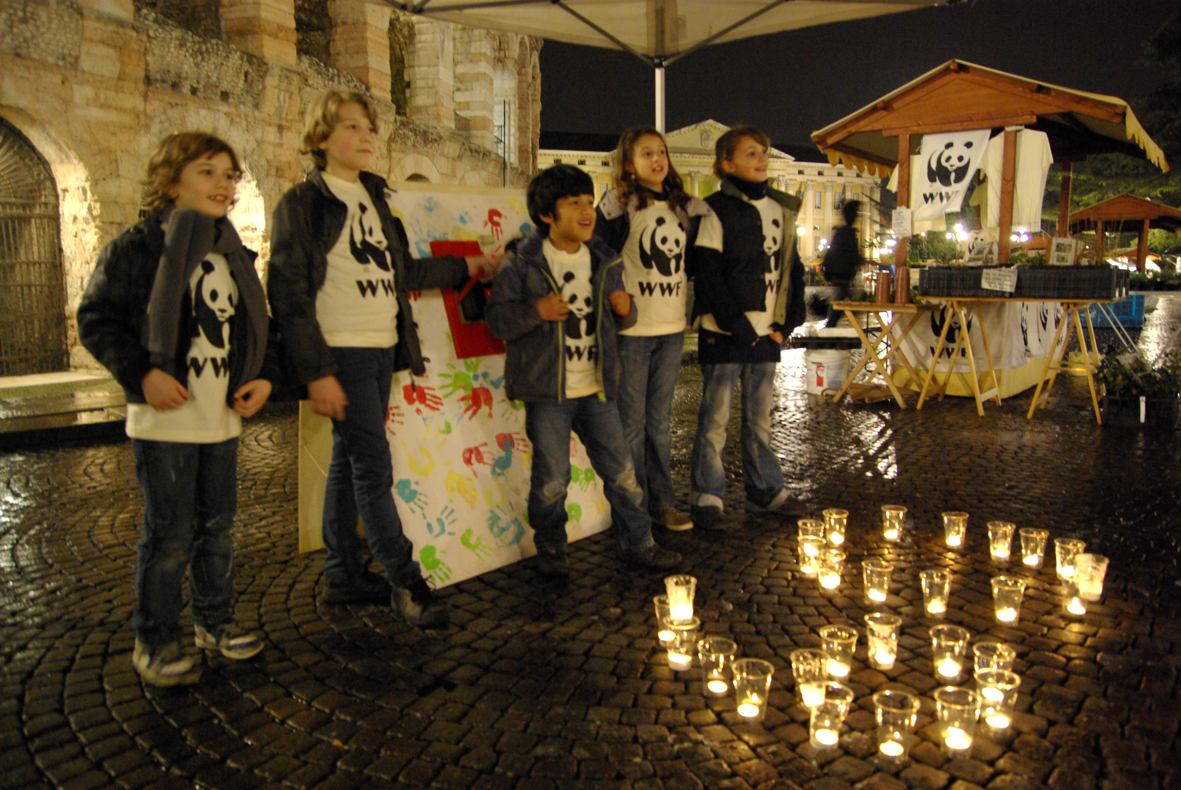 Ora della Terra Verona Piazza Bra Arena 2013 WWF Verona Paolo Villa. Fotocamera Pentax K10D, obbiettivo Tamron AF 17-50mm f2,8 XR Di II LD Aspherical [IF], risoluzione originale 10mp da file formato PEF